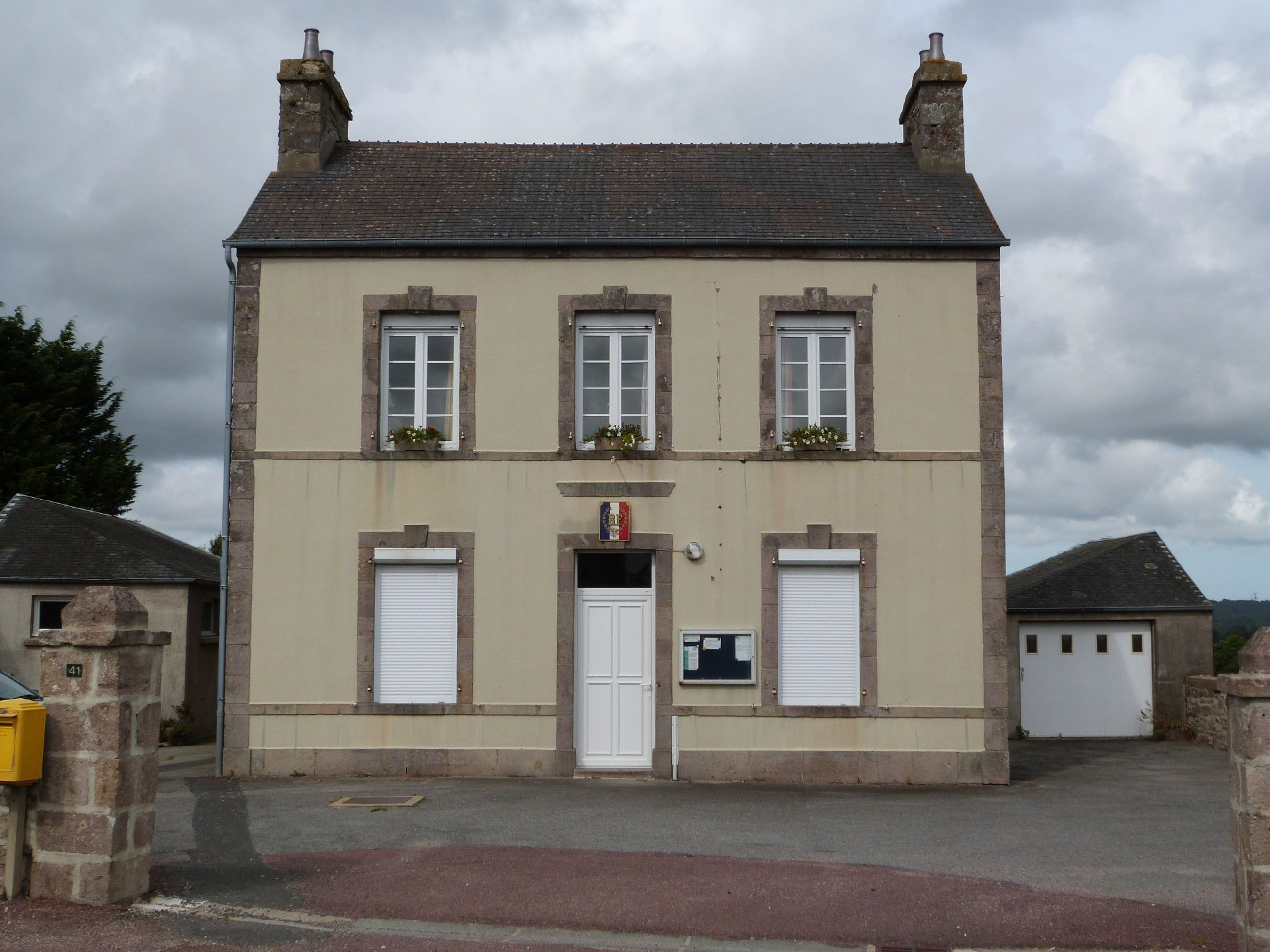 Mairie de Saint-Martin-le-Greard